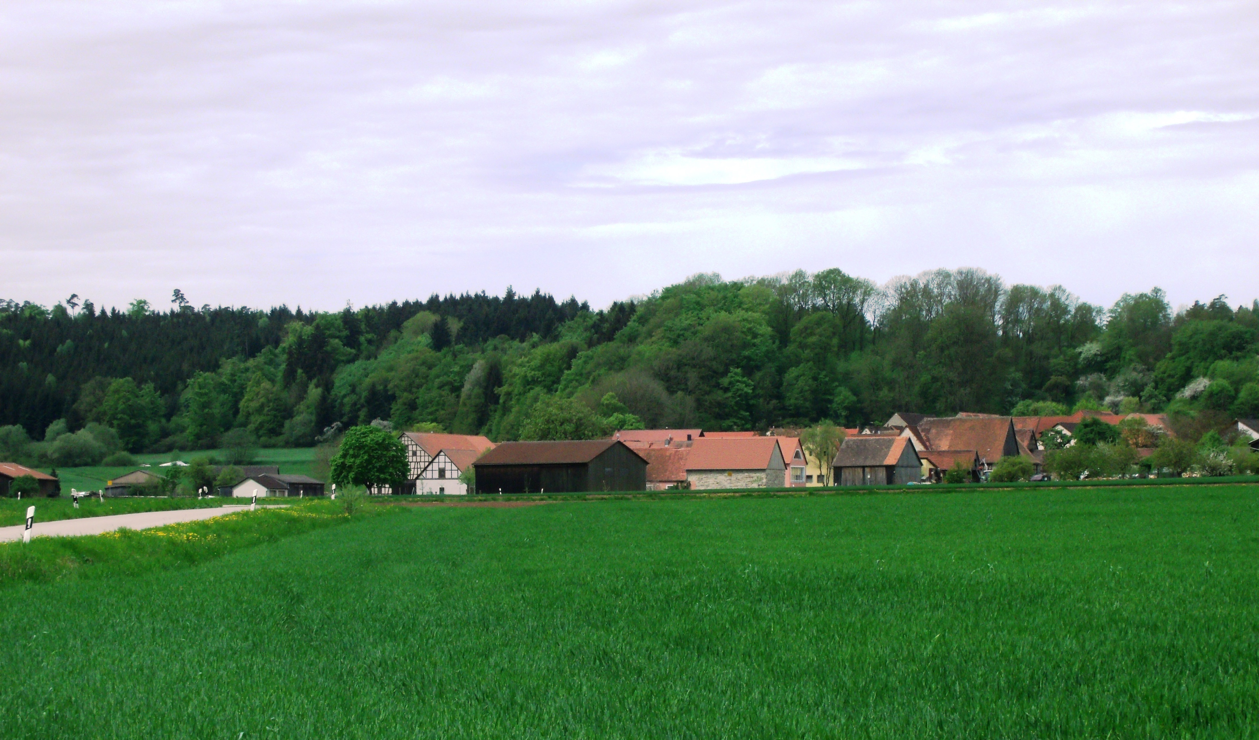 Aidenau, Ortsteil von Geslau im mittelfränkischen Landkreis Ansbach